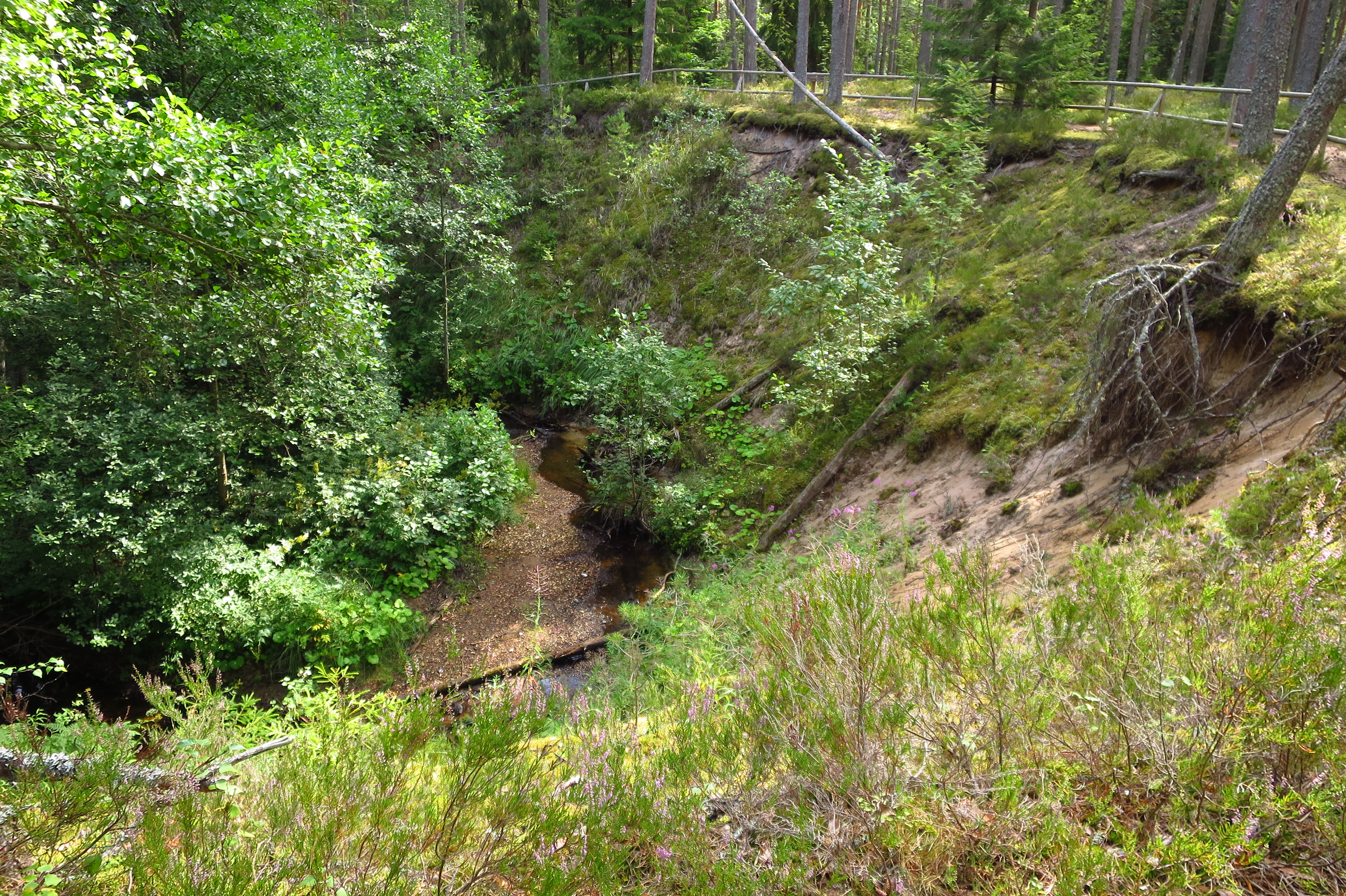 Vanajõe org Tihu looduskaitsealal